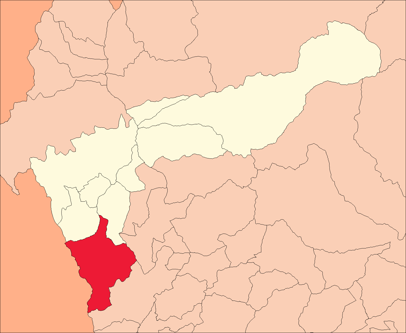 Ubicación del distrito de La Unión.